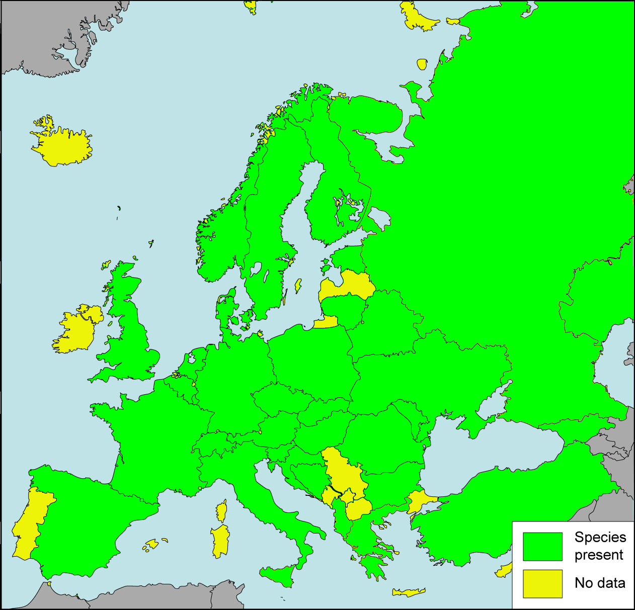 Species present No data